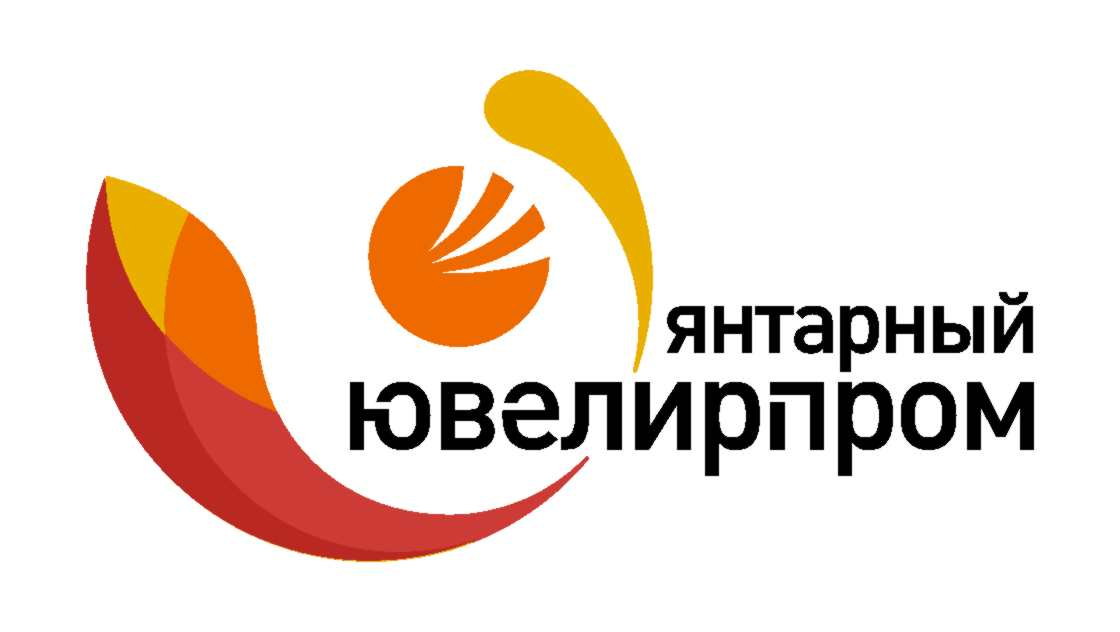 Логотип АО «Янтарный Ювелирпром», 100% дочернего предприятия АО «Калининградский янтарный комбинат»